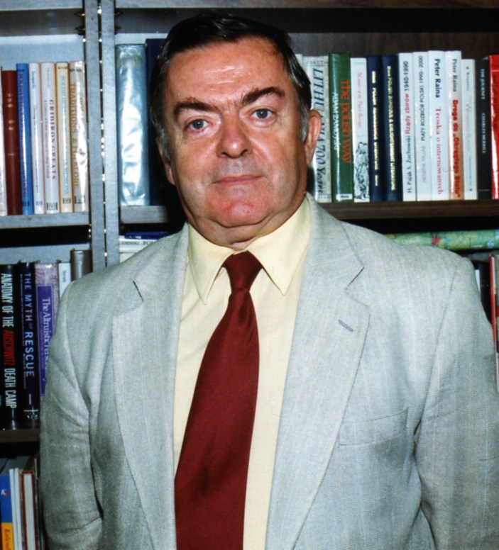 Dr. W.A.Wierzewski, editor.